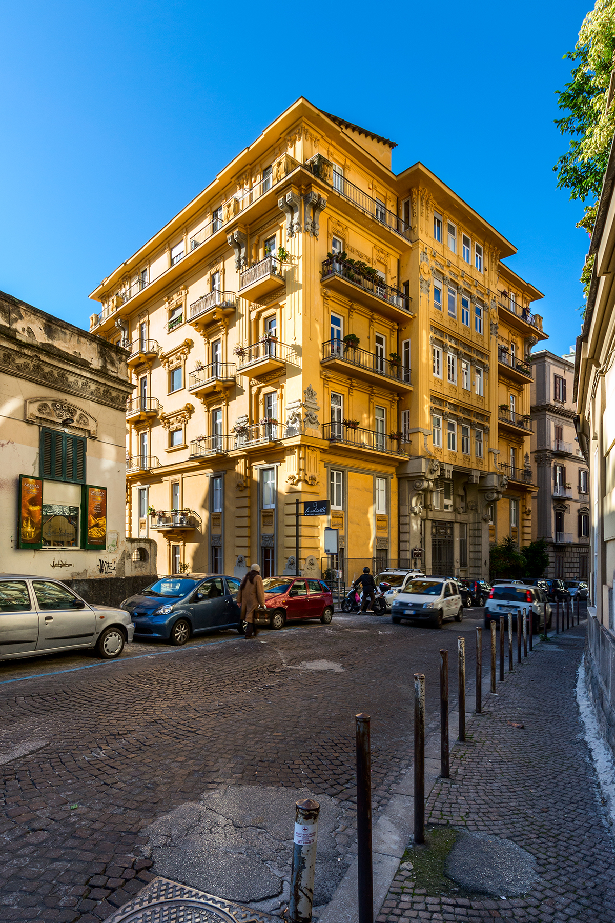 Prospetto su via Parco Margherita.